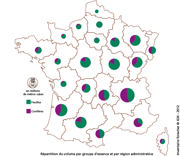 Répartition en France du volume sur pied selon le groupe d'essence